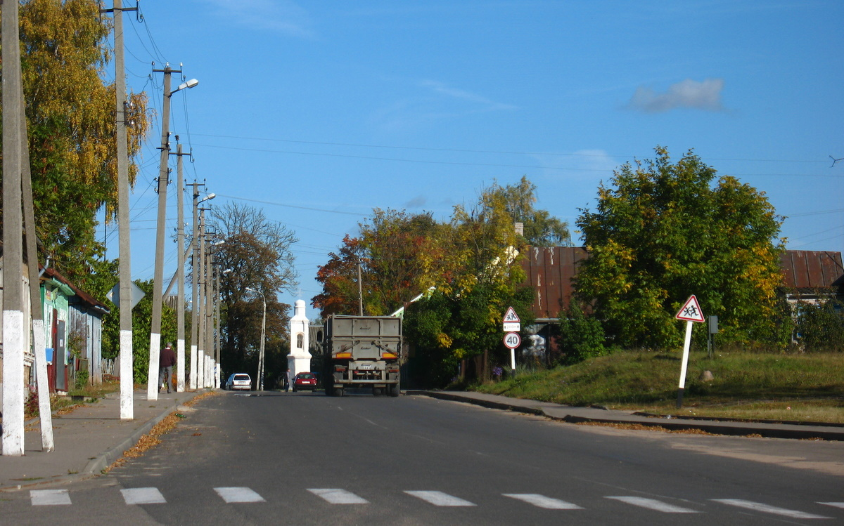 Ражанка